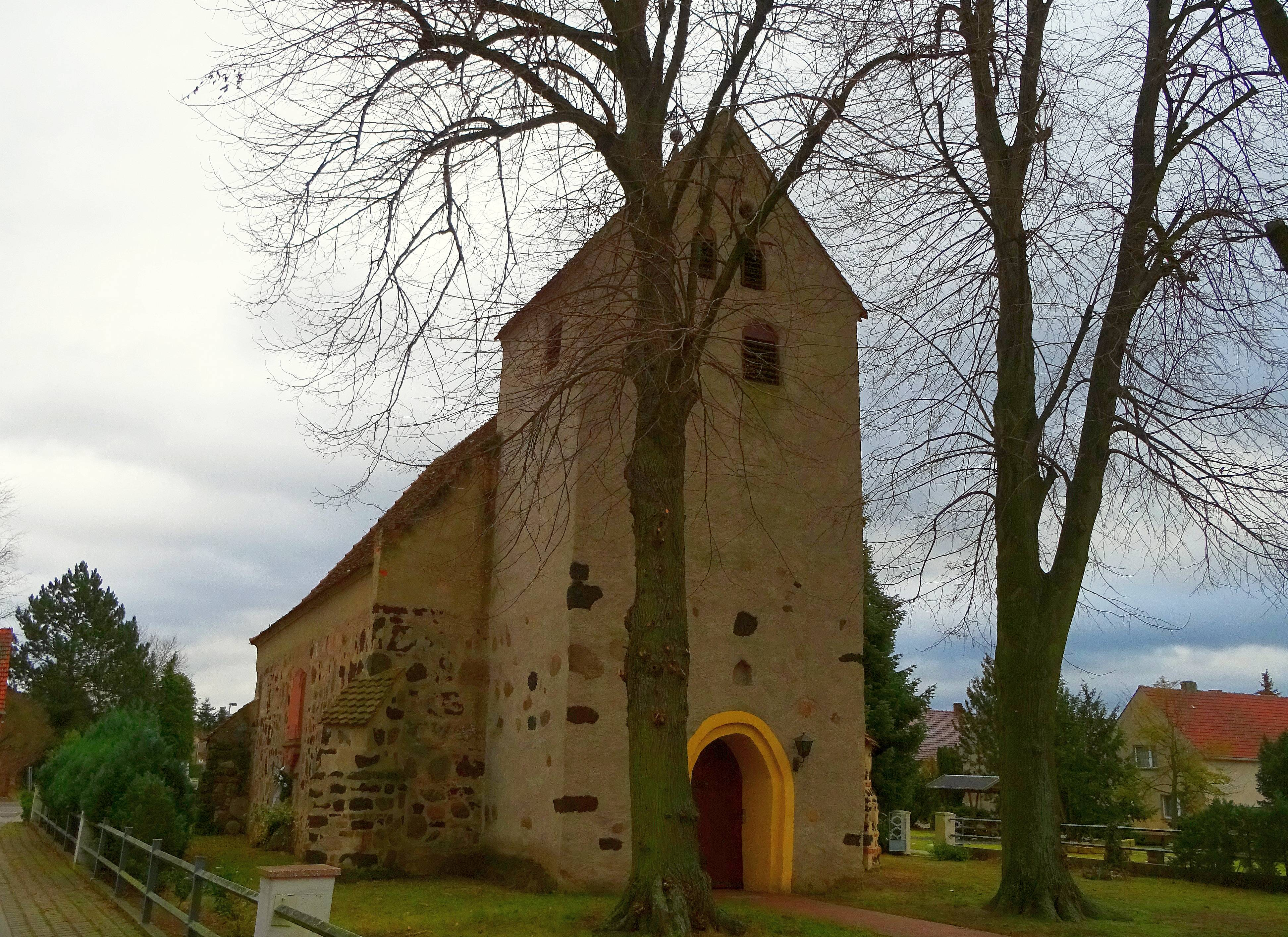 Kirche in Schilda (Church of Schilda)